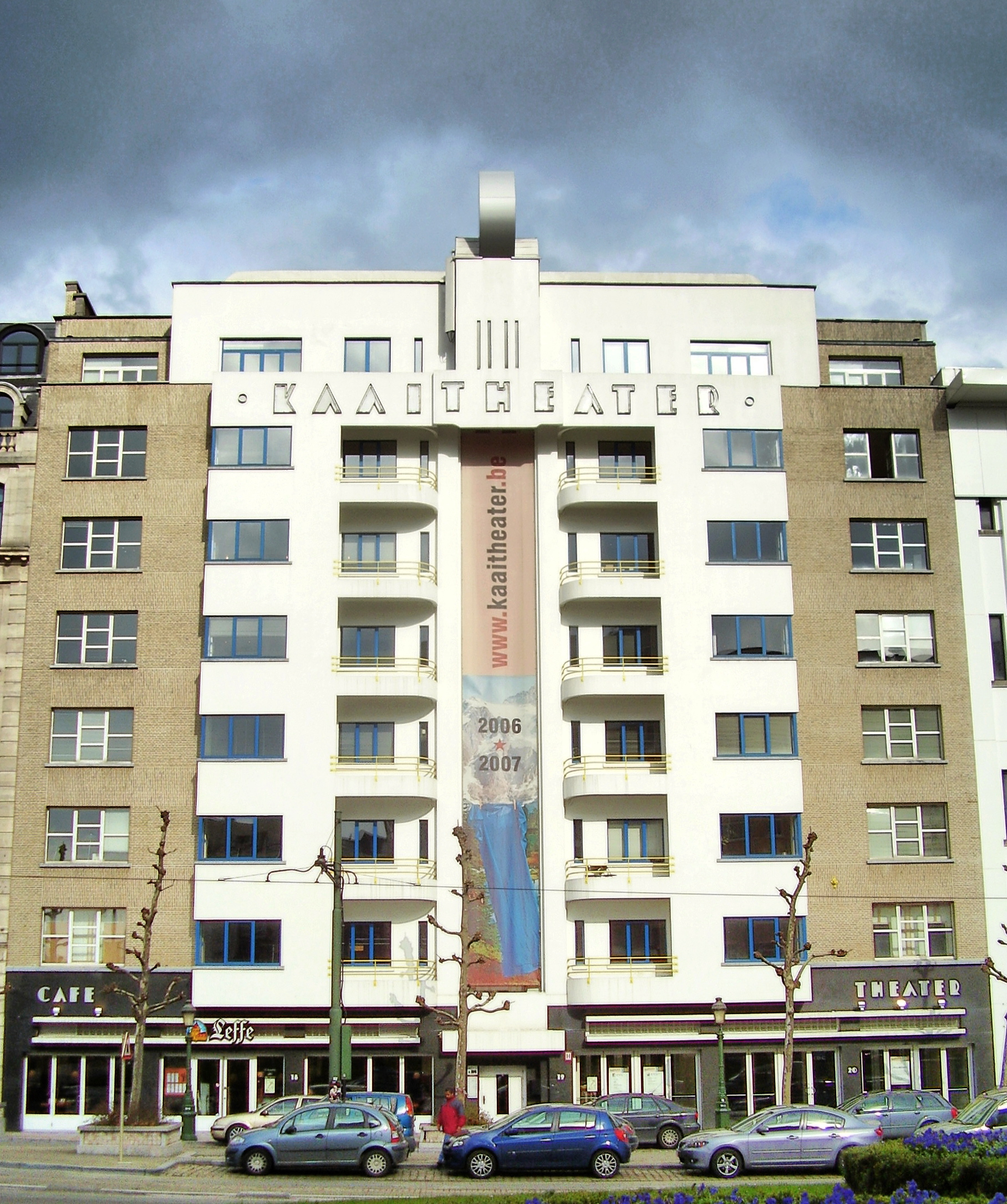 Le Kaaitheater à Bruxelles / Immeuble La Luna, Place Sainctelette 20 et Quai des Péniches 4, Architecte: Marcel Driesman, construction: 1929-1932